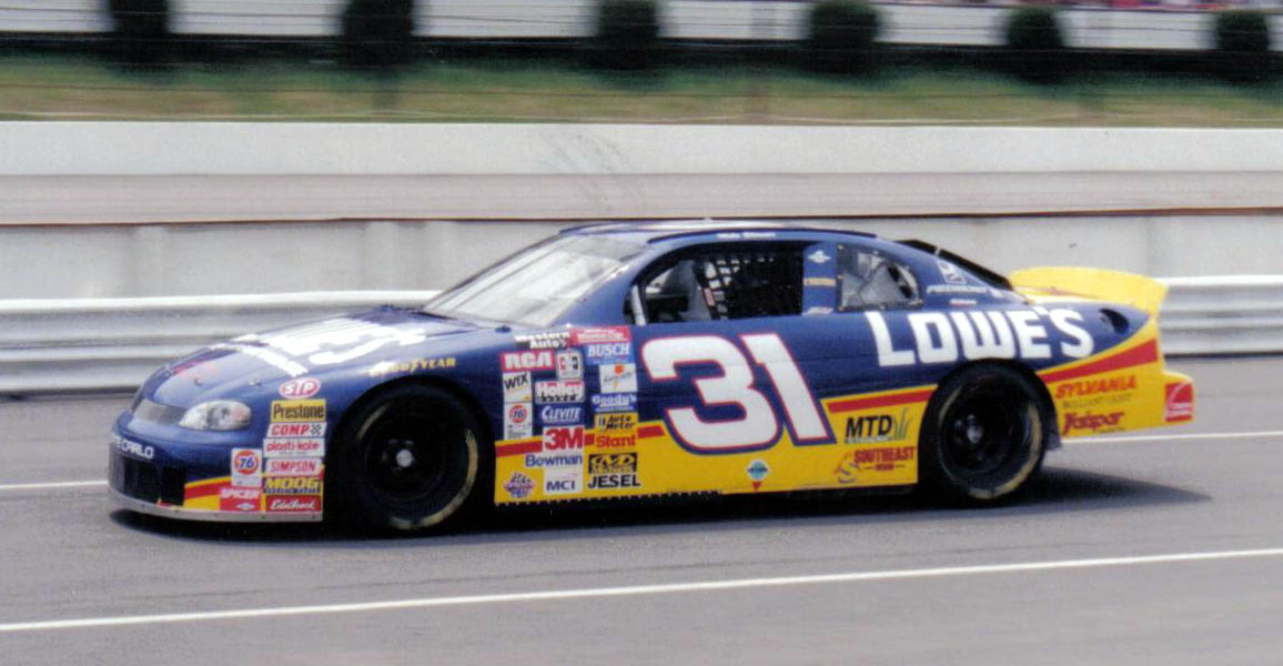 NASCAR driver Mike Skinner (NASCAR) at Pocono in 1997.